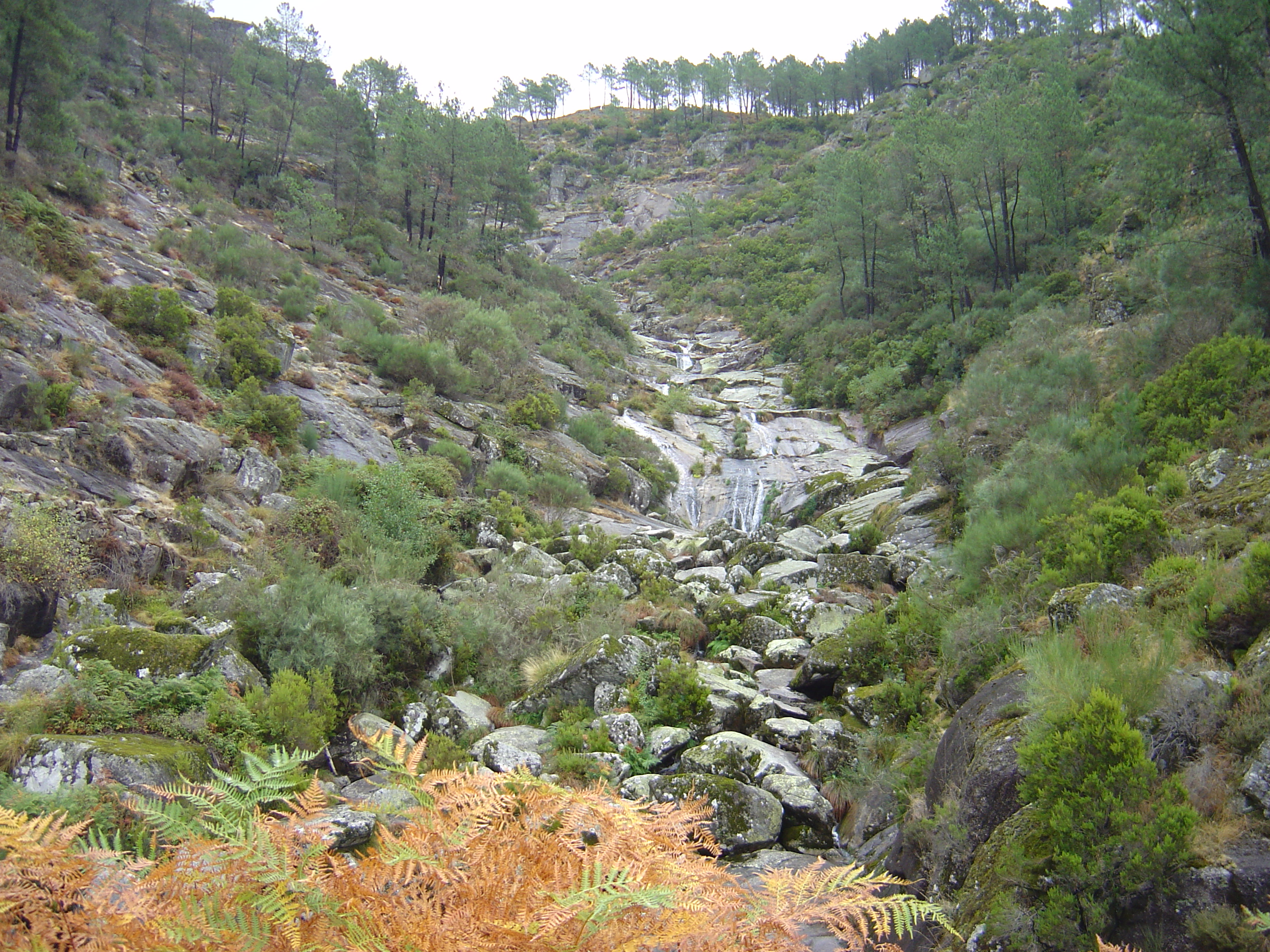 Alvão Natural Park, Portugal